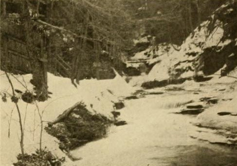 Elmira and Seneca Lake Railway - Eingang zur Havana-Klam